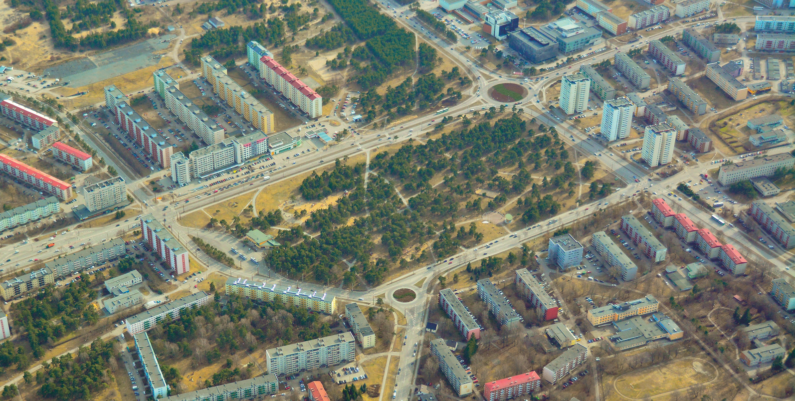 Õhuvaade Männi pargile